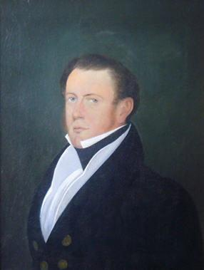 Jorge Tornquist (1801-1876) empresario estadounidense